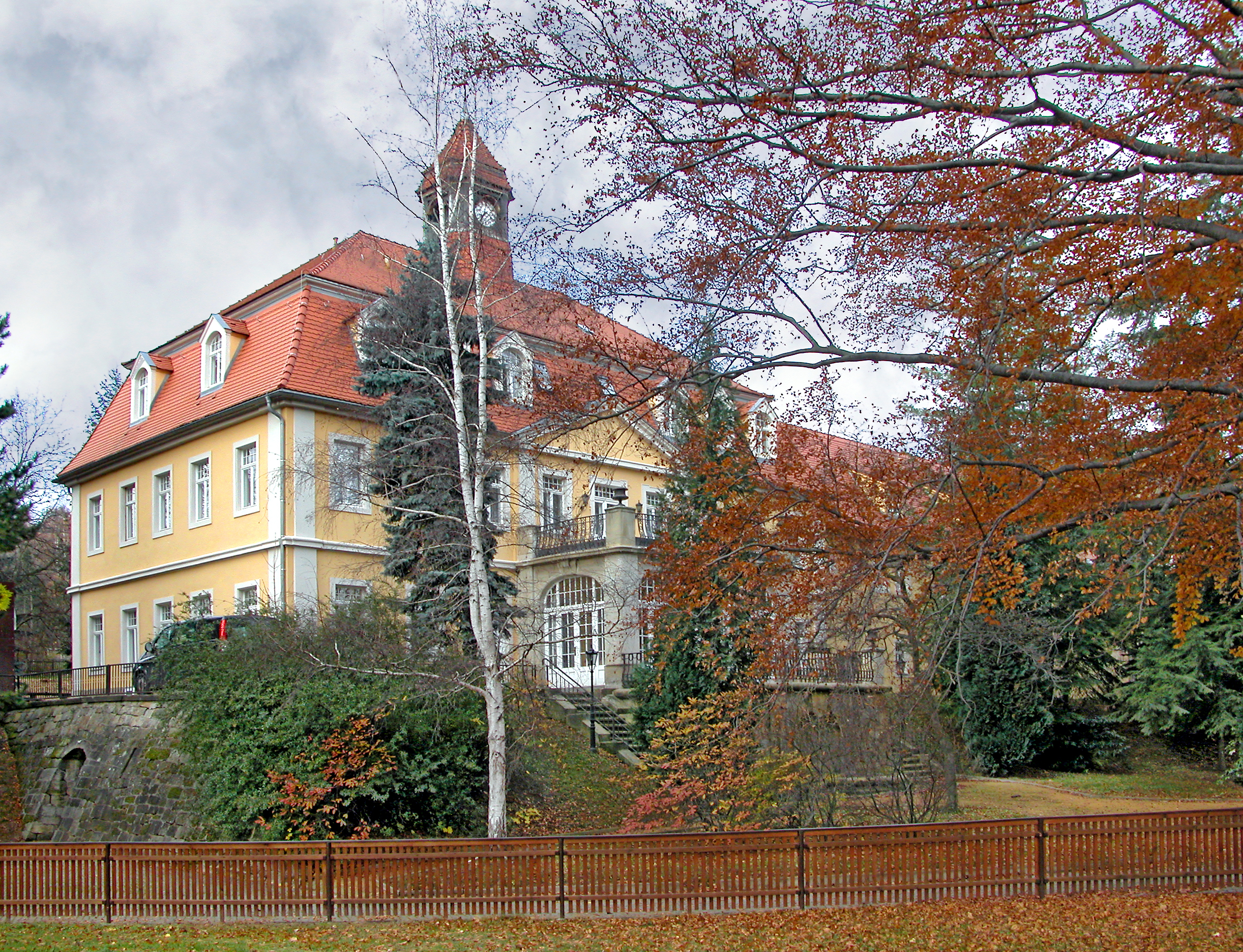 19.11.2006 01819 Berggießhübel, Am Schloß 1 (GMP: 51.875785,13.947131): Aus einem 1452 erstmals genannten Vorwerk ging ein Rittergut hervor, das seit dem 17. Jahrhundert unter dem Namen 'Friedrichsthal' bekannt ist. Das heutige Schloß wurde 1908 für den Grafen von Rex errichtet. 1945 wurde er enteignet. Ab 1948 wird das Schloß als Kureinrichtung genutzt und 1998 saniert. Wegen rückläufiger Patientenzahlen mußte die Kurklinik nach 7 Jahren schließen. 2006 ging das Schloß an einen neuen Eigentümer, der hier ein Kurhotel betreibt. Sicht von Südosten. [DSCN20157.TIF]20061119215DR.JPG(c)Blobelt